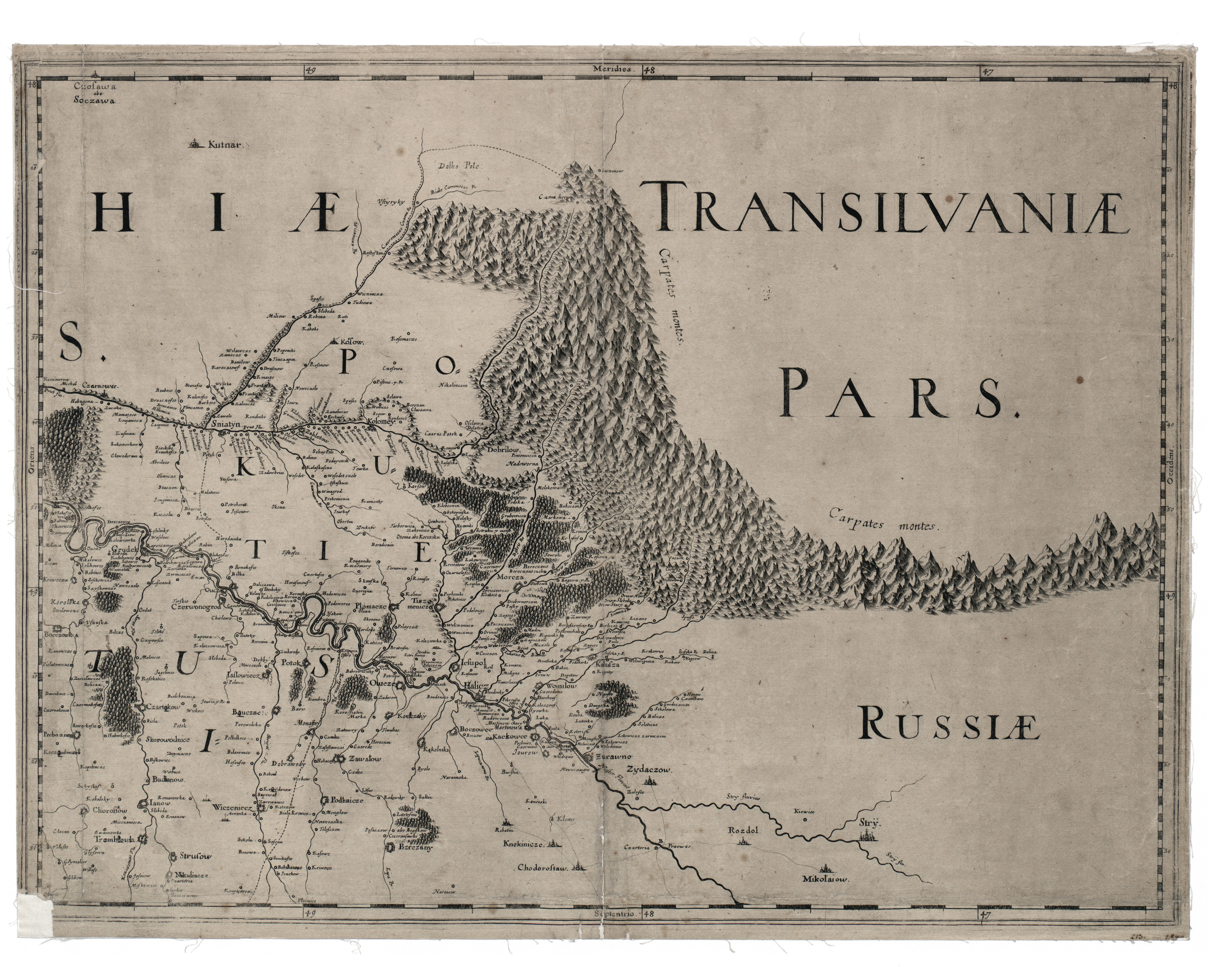 Фрагмент Спеціальної мапи України Гійома Левассера де Боплана, 1650.